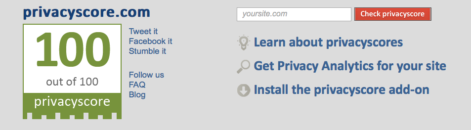 Eksempel på resultat fra Privacyscore